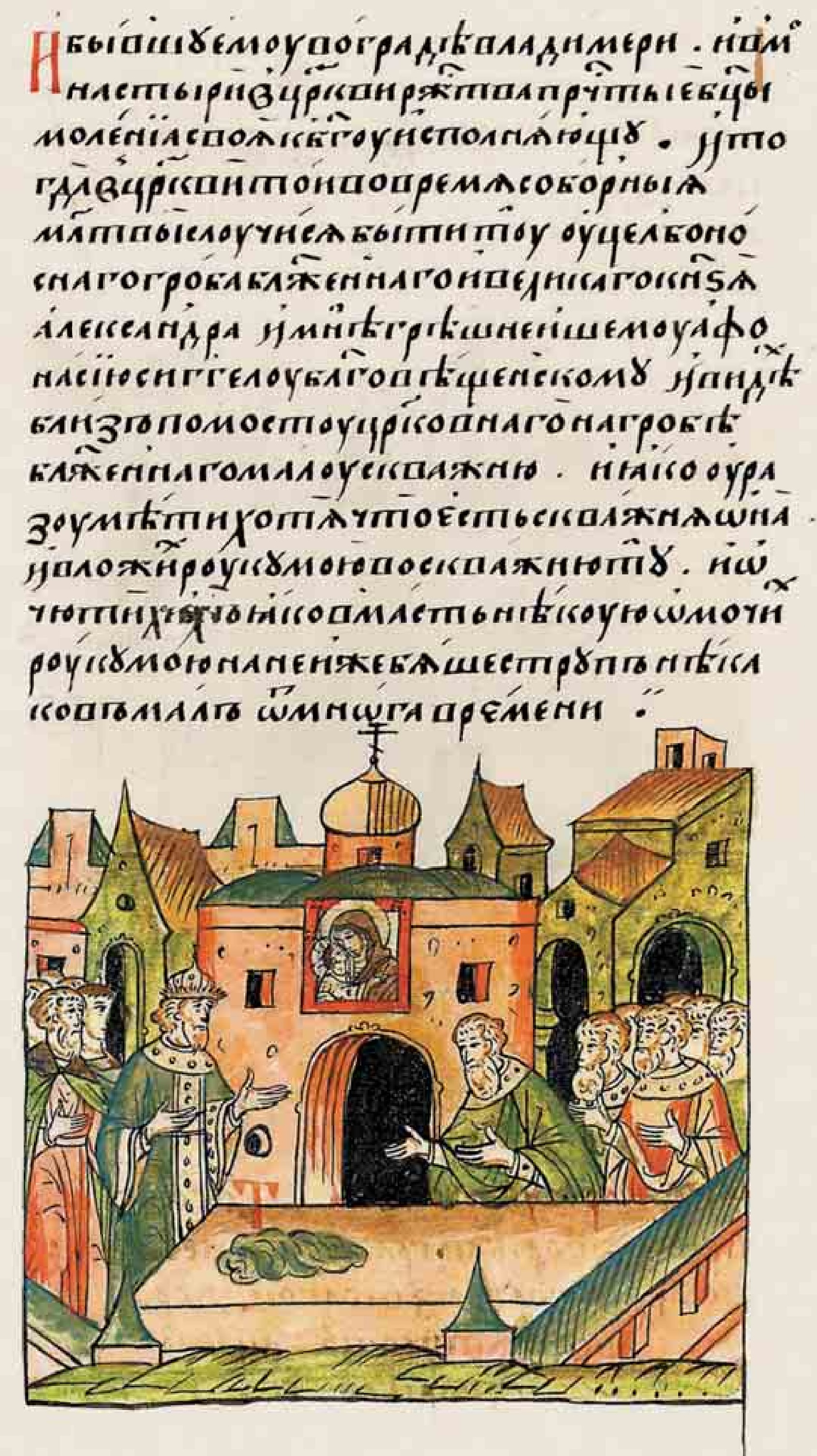 Исцелении руки сиггела Благовещенского собора Афанасия от гроба Александра Невского. Лицевой летописный свод Ивана Грозного. Русь (1491 - 1510 гг. от В.Х.) Книга 17 / стр. 159 -163